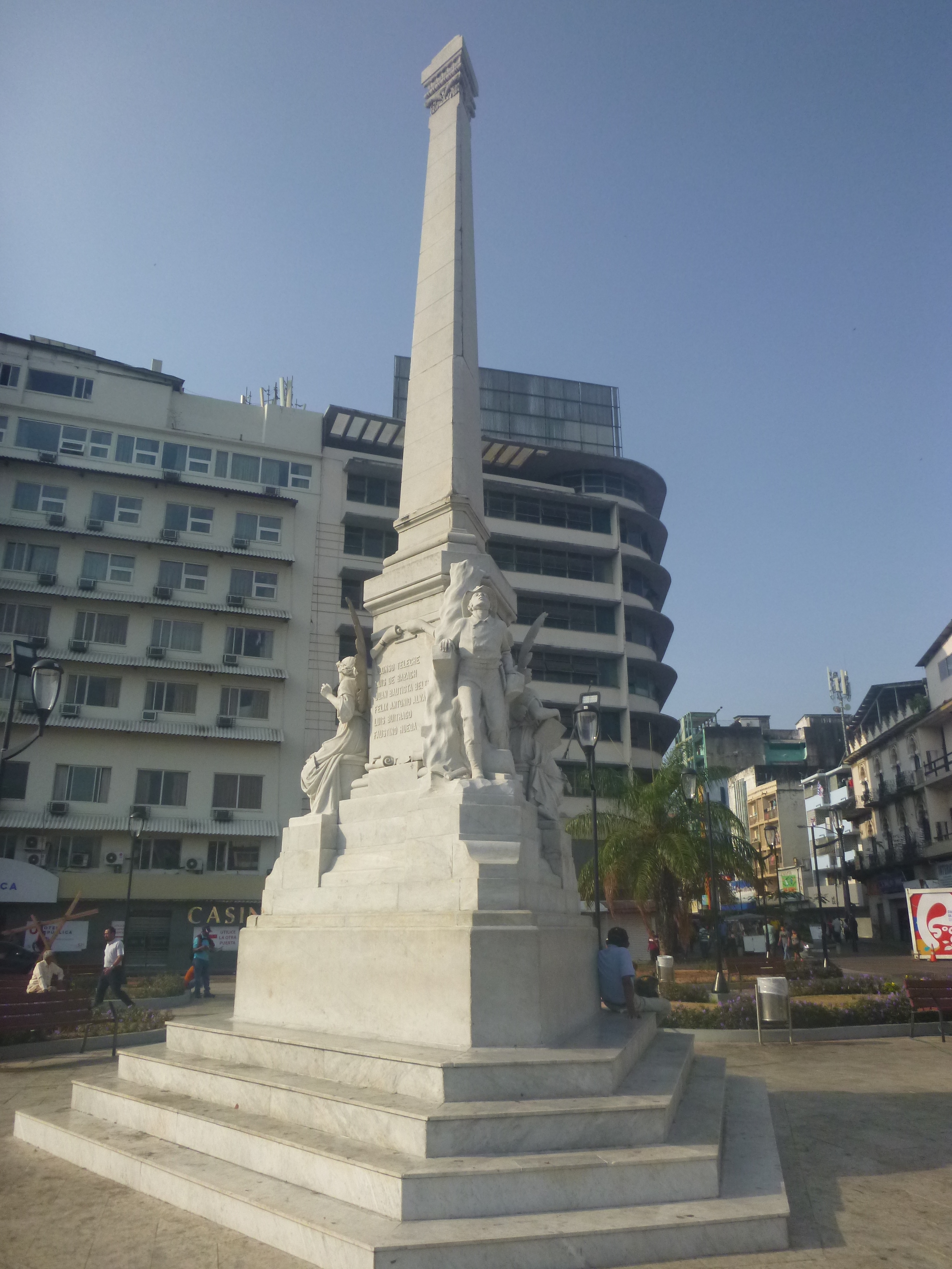 Monumento de Mármol dedicado a los bomberos fallecidos en la tragedia del polvorín